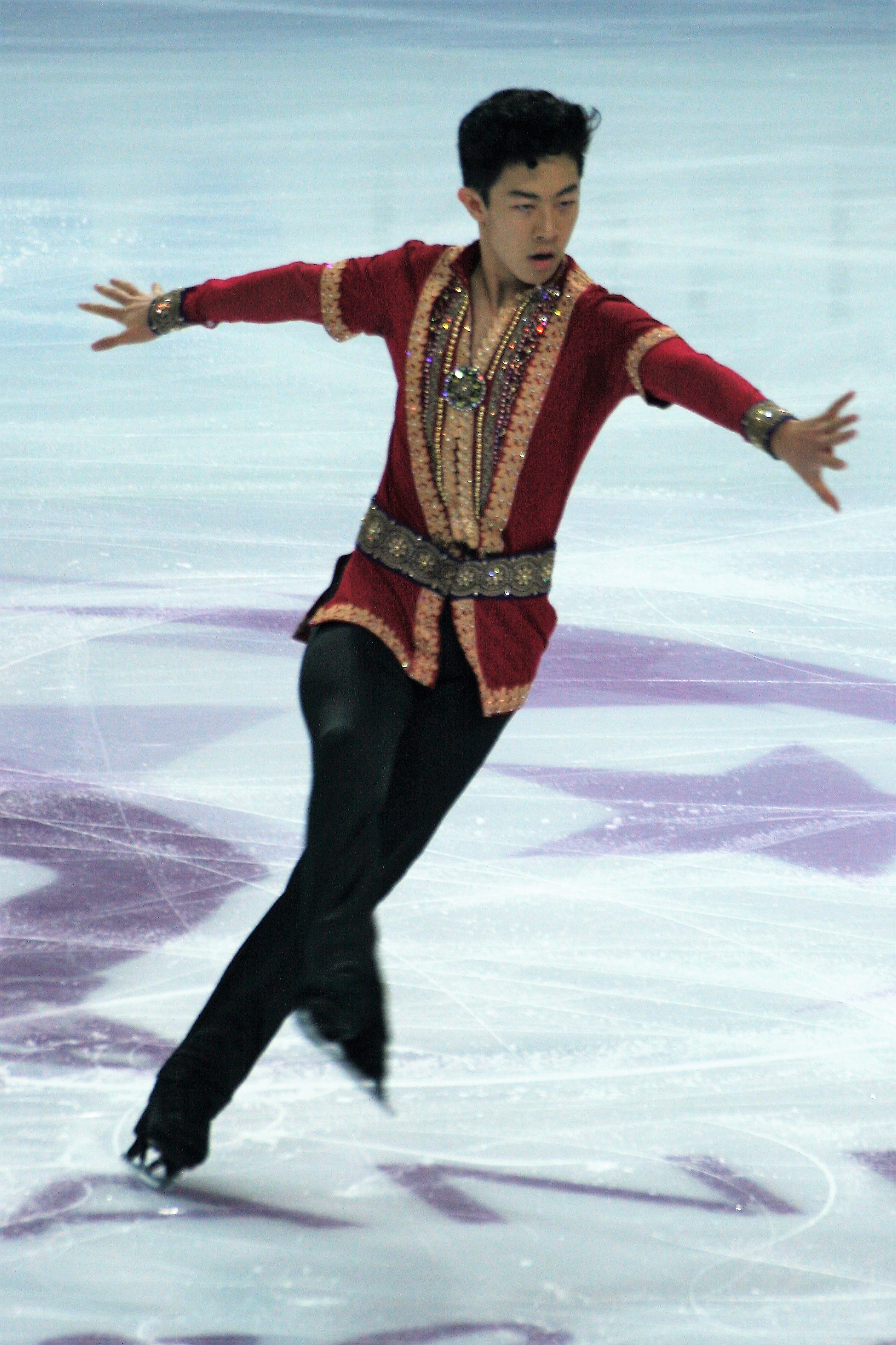 Нейтан Чен (США) на финале Гран-при по фигурному катанию 2016-2017